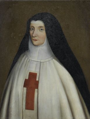 Angélique de Saint-Jean Arnauld d'Andilly (1591-1661), abbesse de Port Royal des Champs